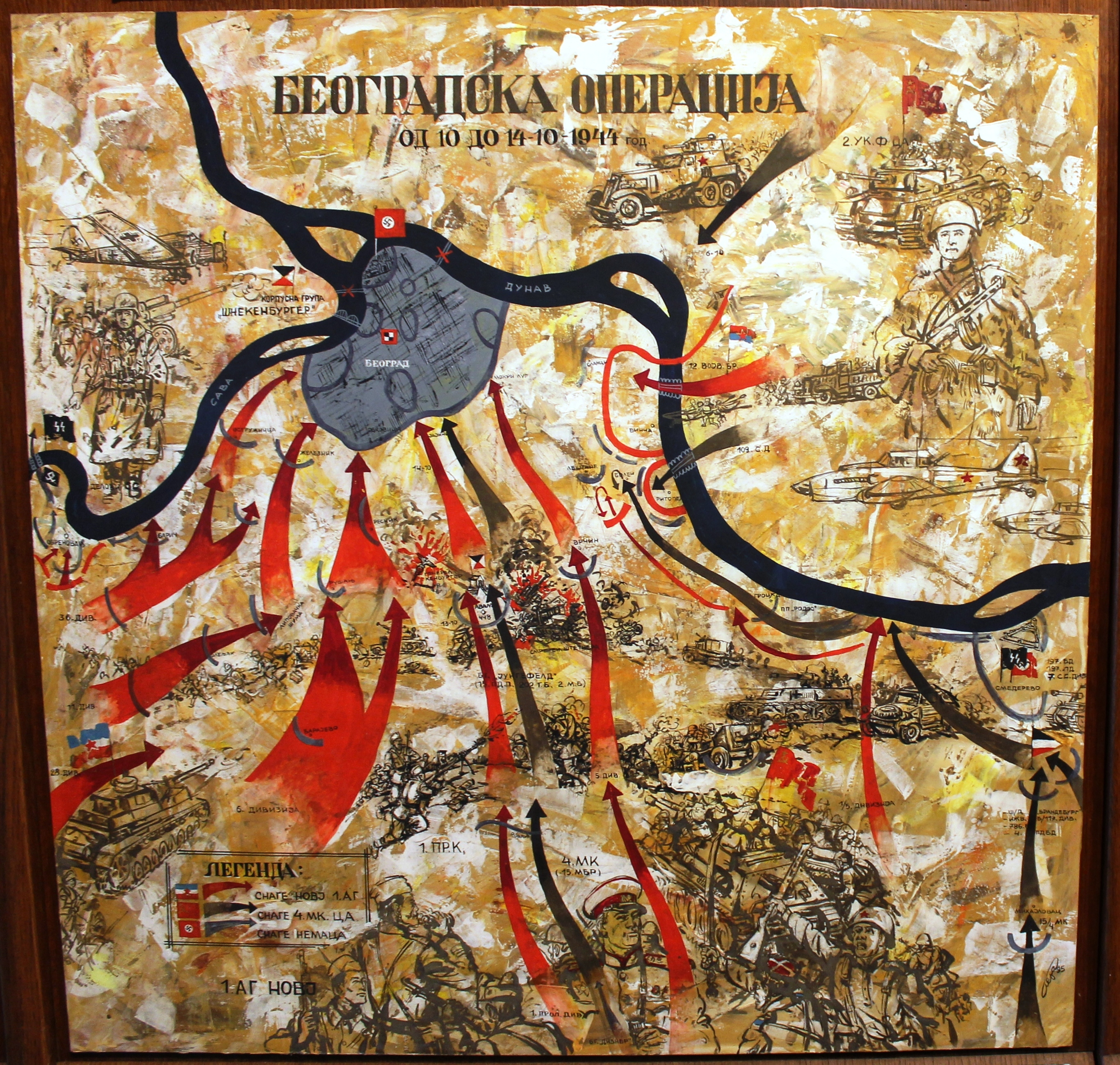 Мапа Београдске операције из 1944 године која се налази у Спомен-комплексу Сремски фронт